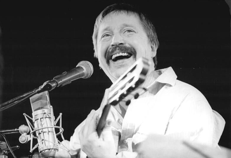 ADN-ZB / Grubitzsch / 1.12.89 / Leipzig: Biermann-Konzert Der Liedermacher, der nach jahrelangen Auftrittsverboten 1976 während einer BRD-Tournee ausgebürgert worden war, trat zum erstenmal wieder in der DDR auf. In der Messehalle 2 wurde er von den etwa 5.000 Besuchern mit einem Beifallsorkan empfangen. (siehe auch 47N)